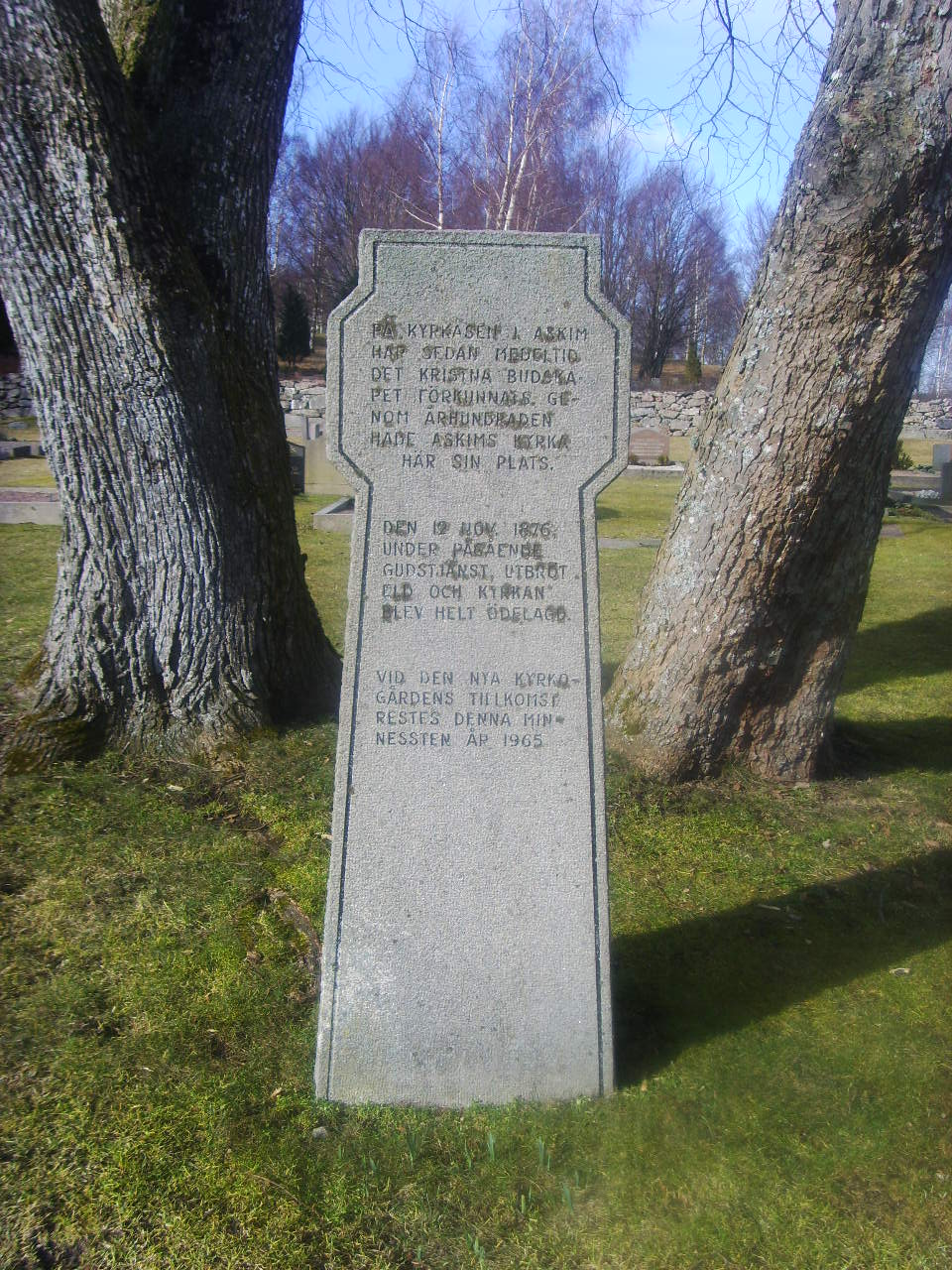 På minnesstenen står det: "På kyrkåsen i Askim har sedan medeltid det kristna budskapet förkunnats. Genom århundraden hade Askims kyrka här sin plats. Den 12 nov 1876 under pågående gudstjänst utbröt eld och kyrkan blev helt ödelagd. Vid den nya kyrkogårdens tillkomst restes denna minnessten år 1965."